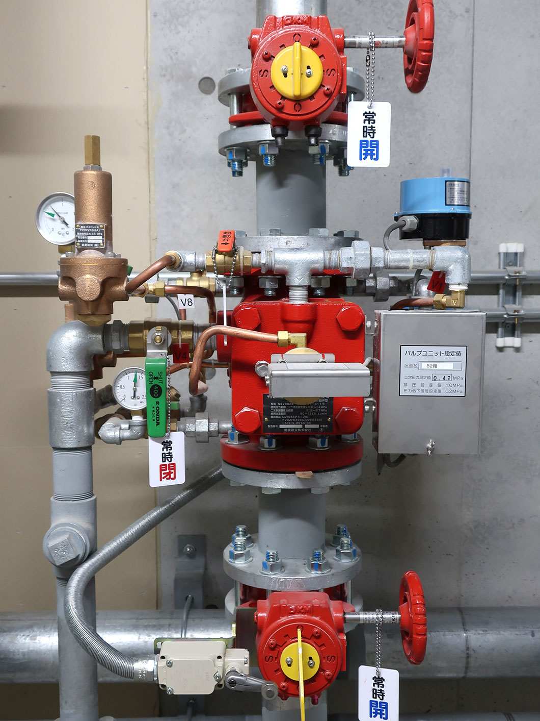 消火スプリンクラーの予作動式流水検知装置